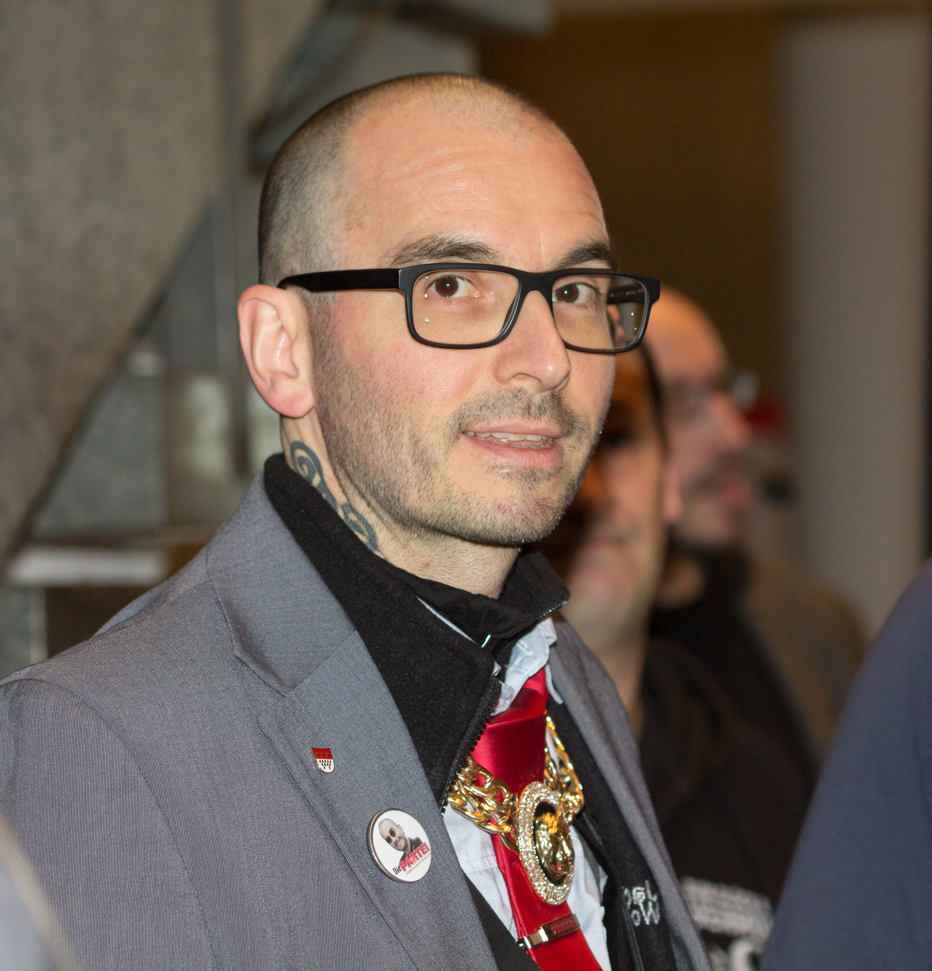 Oberbürgermeisterwahl in Köln 2015 – Wahlabend in der Piazetta des Historischen Rathauses. OB-Kandidat Mark Benecke (DIE PARTEI)